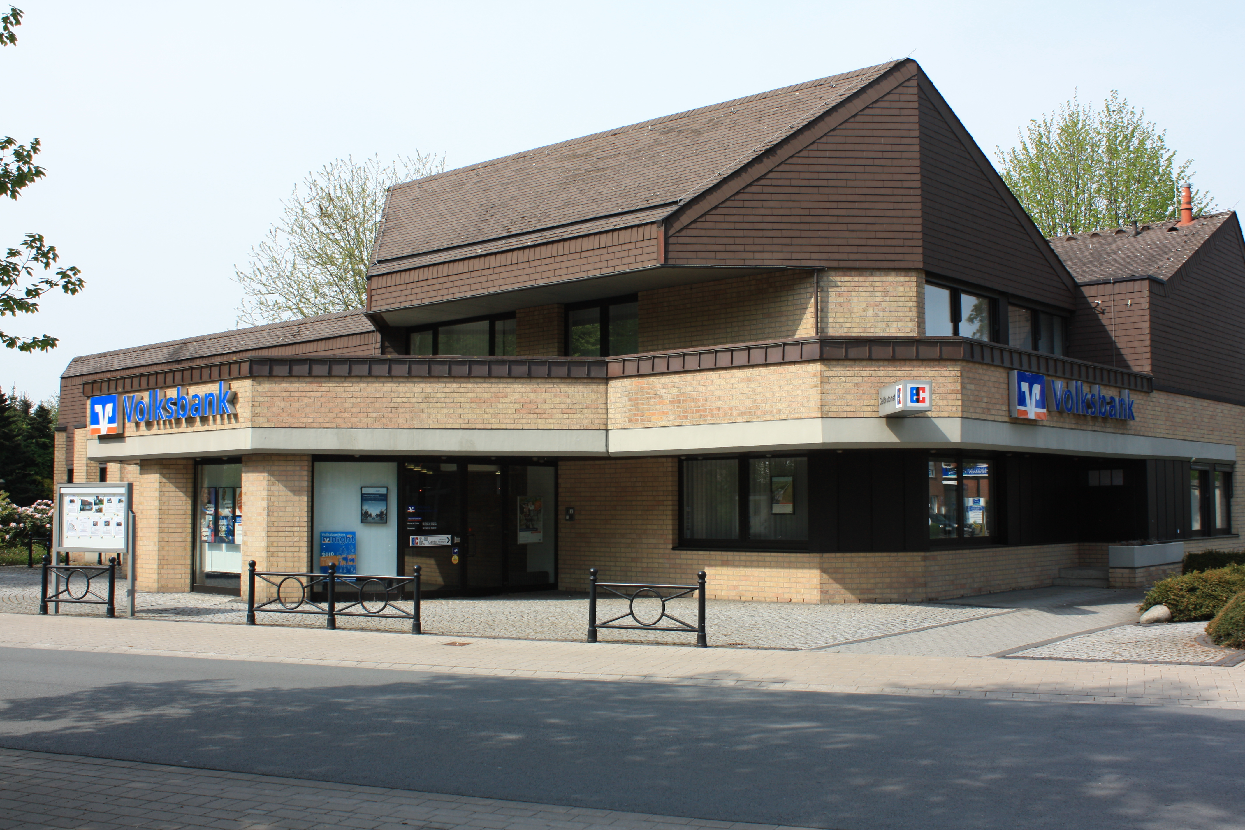 Volksbank Harsewinkel; Filiale Marienfeld. Erbaut 1980.